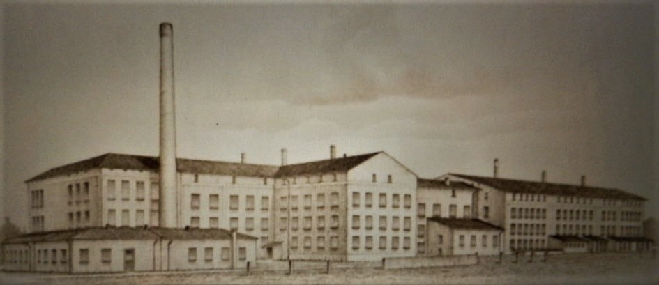 Porzellanfabrik Sorau, Rückseite um 1930, Grafik aus zeitgenössischen Werbeanzeigen